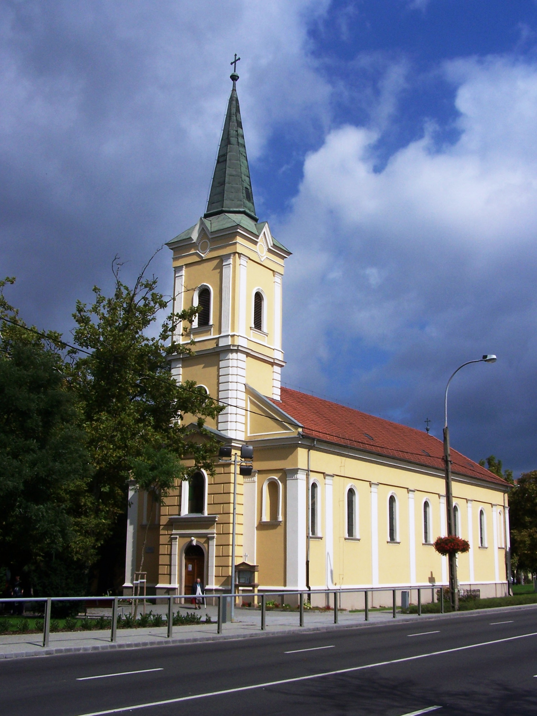 Szent Kereszt felmagasztalása római katolikus templom (Budapest 17, Pesti út)